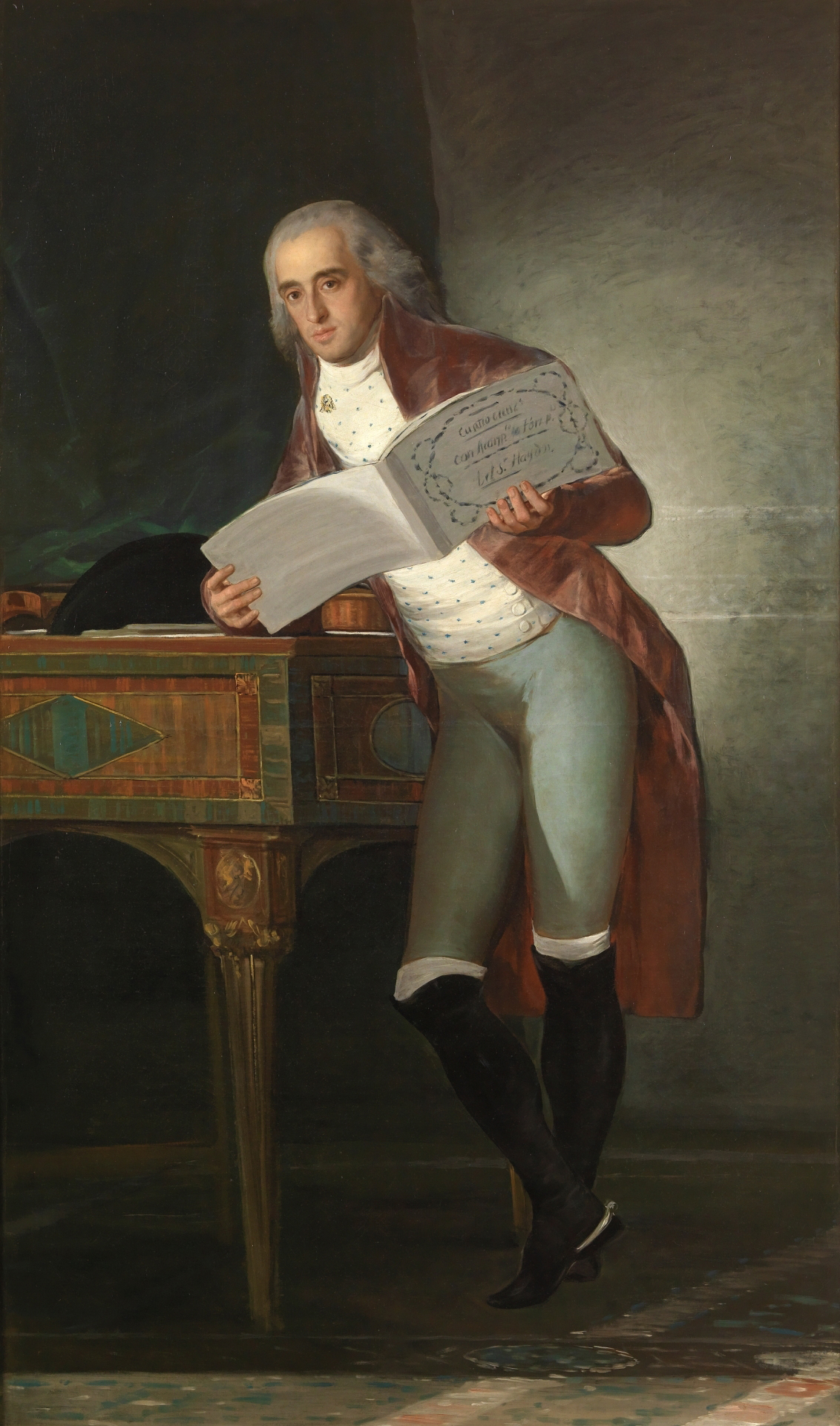 José Álvarez de Toledo y Gonzaga representado en traje de equitación, con espuelas y una partitura de Haydn en las manos.